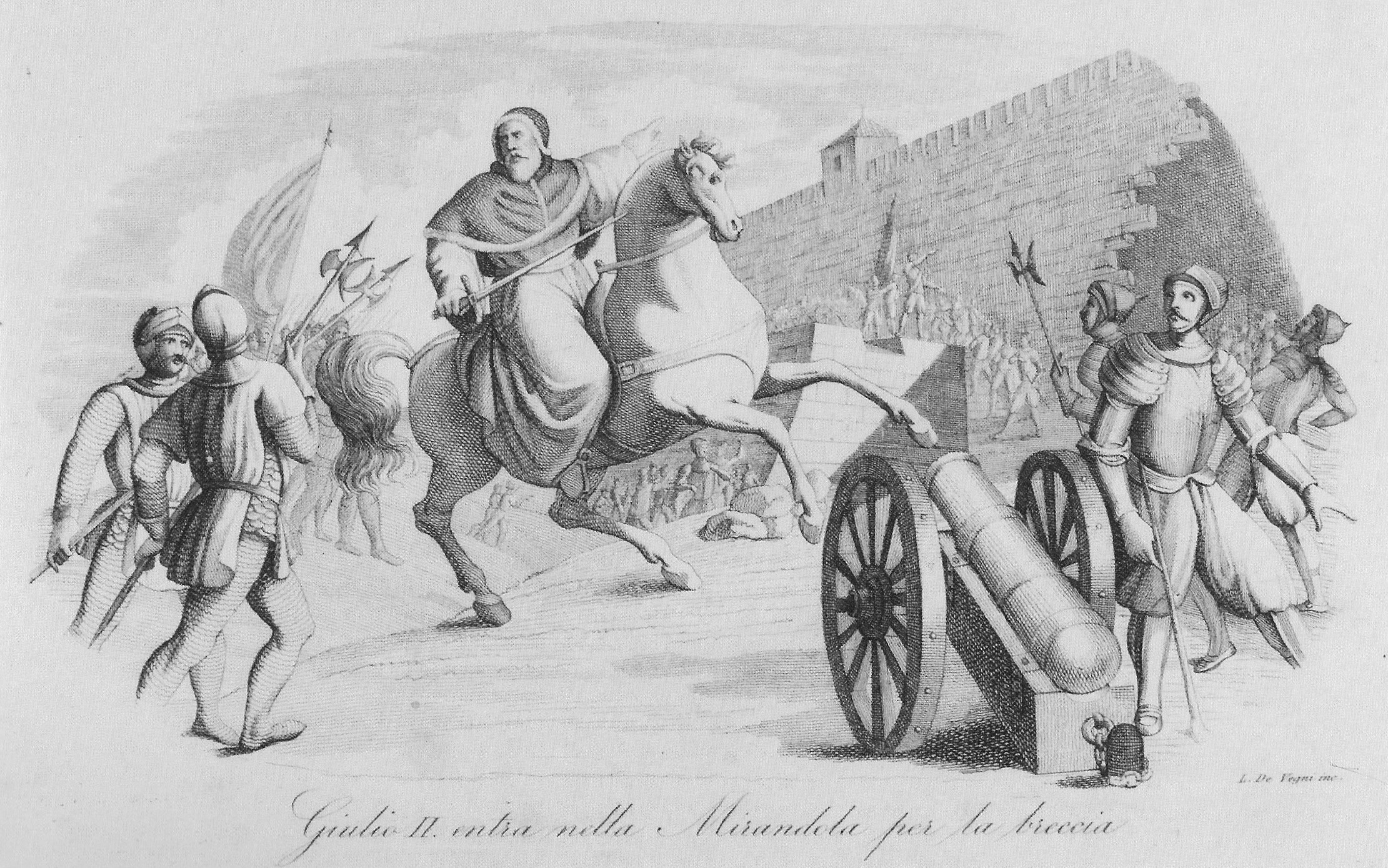 L. De Vegni, Giulio II entra nella Mirandola per la breccia, Ferrario Piccolo, 1840